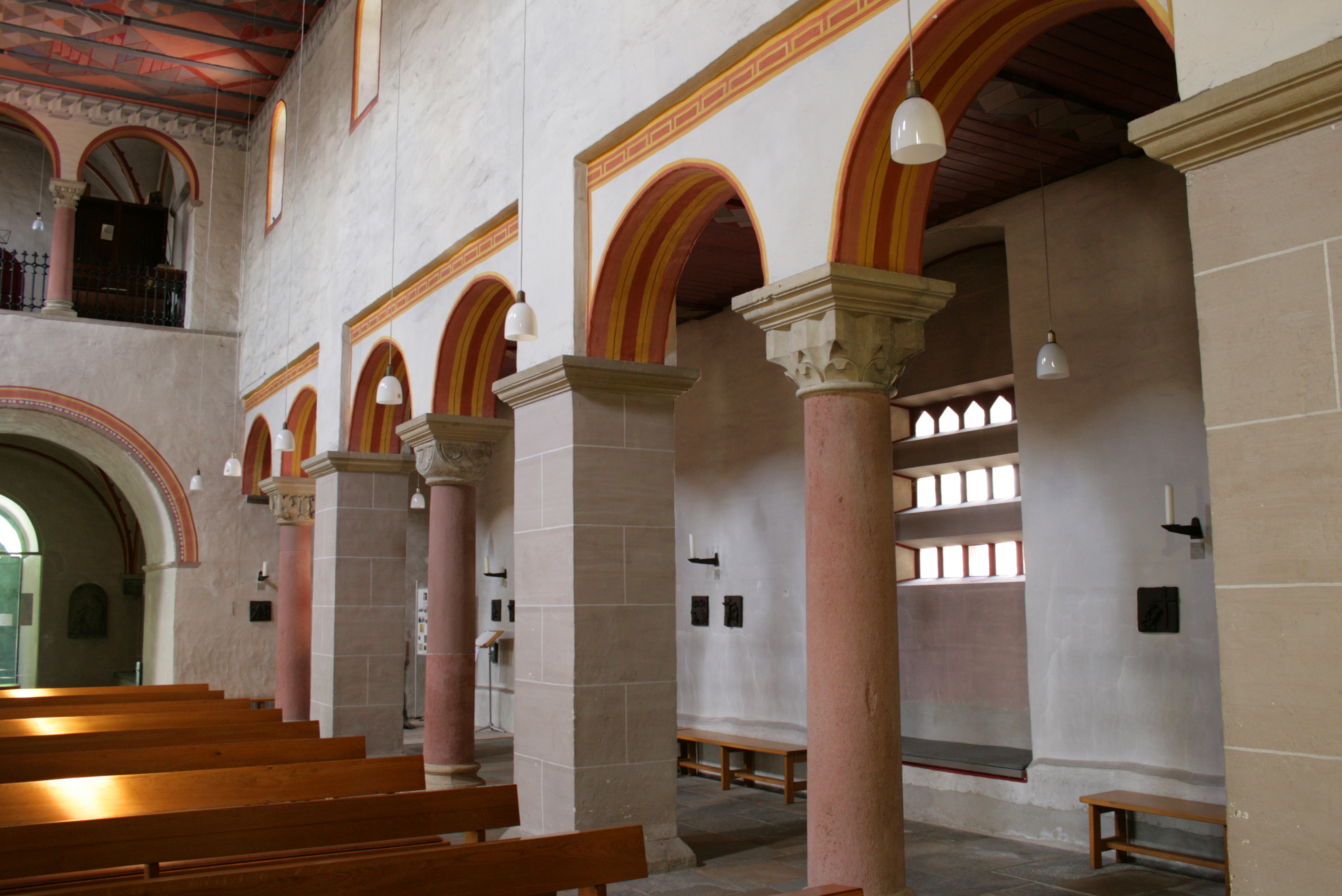 Sankt Lucius in Essen-Werden